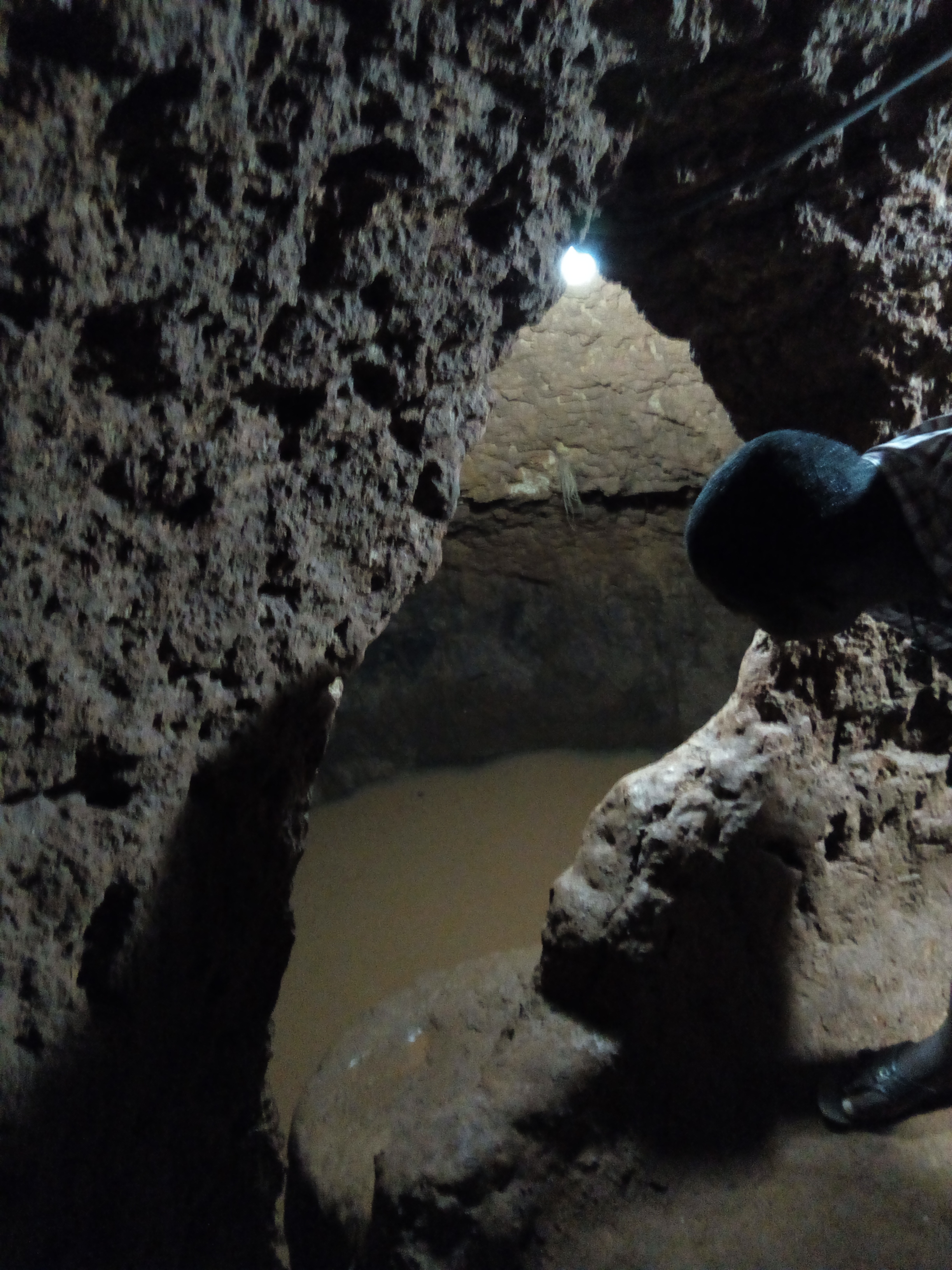 Village souterrain d'Agongointo-Zoungoudo Wikidata has entry Q4693350 with data related to this item.